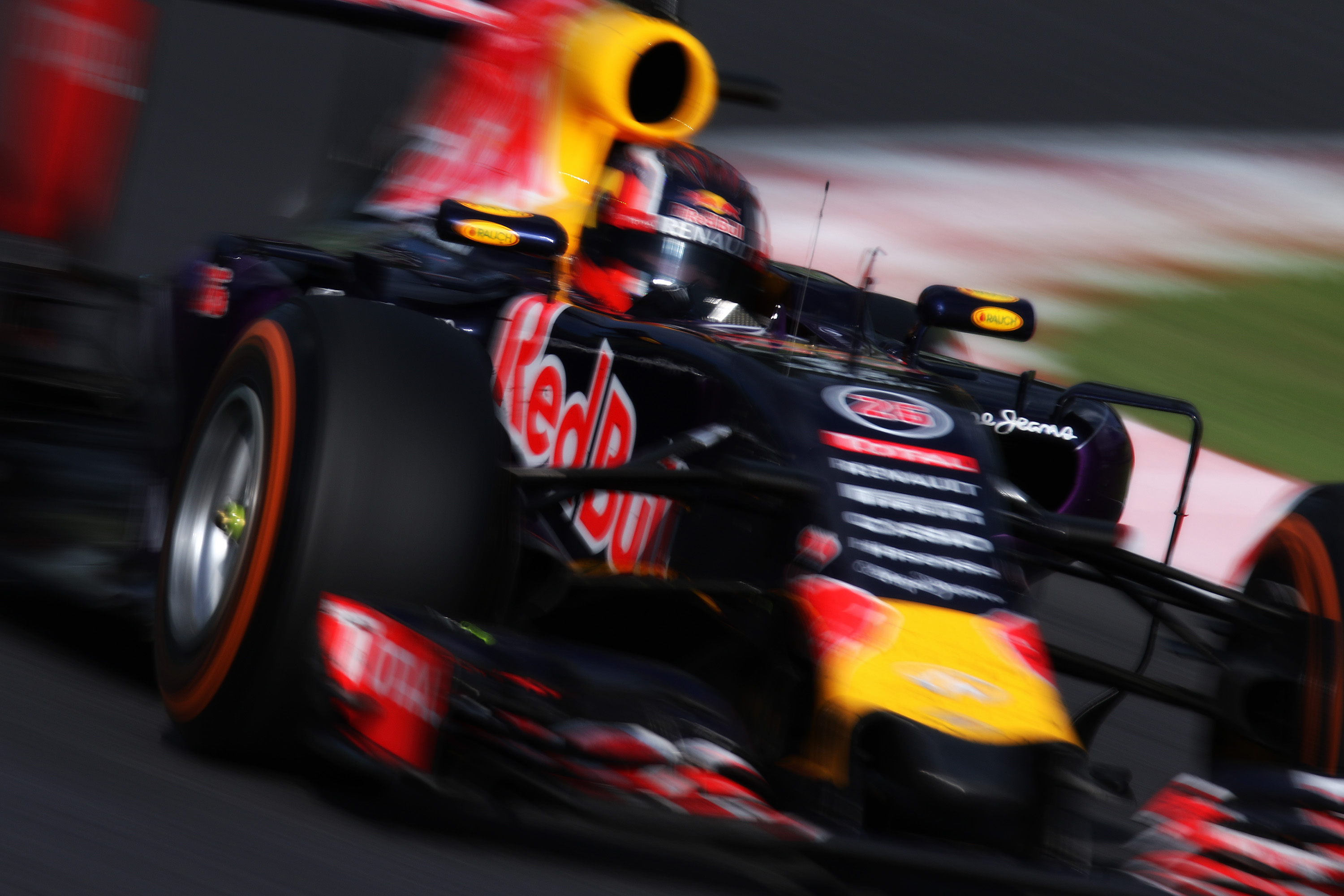 2015.9.27 F1 Rd.14 Suzuka Final Infiniti Red Bull Racing (RB11) 26 ダニール・クビアト [7D2_0571ks]